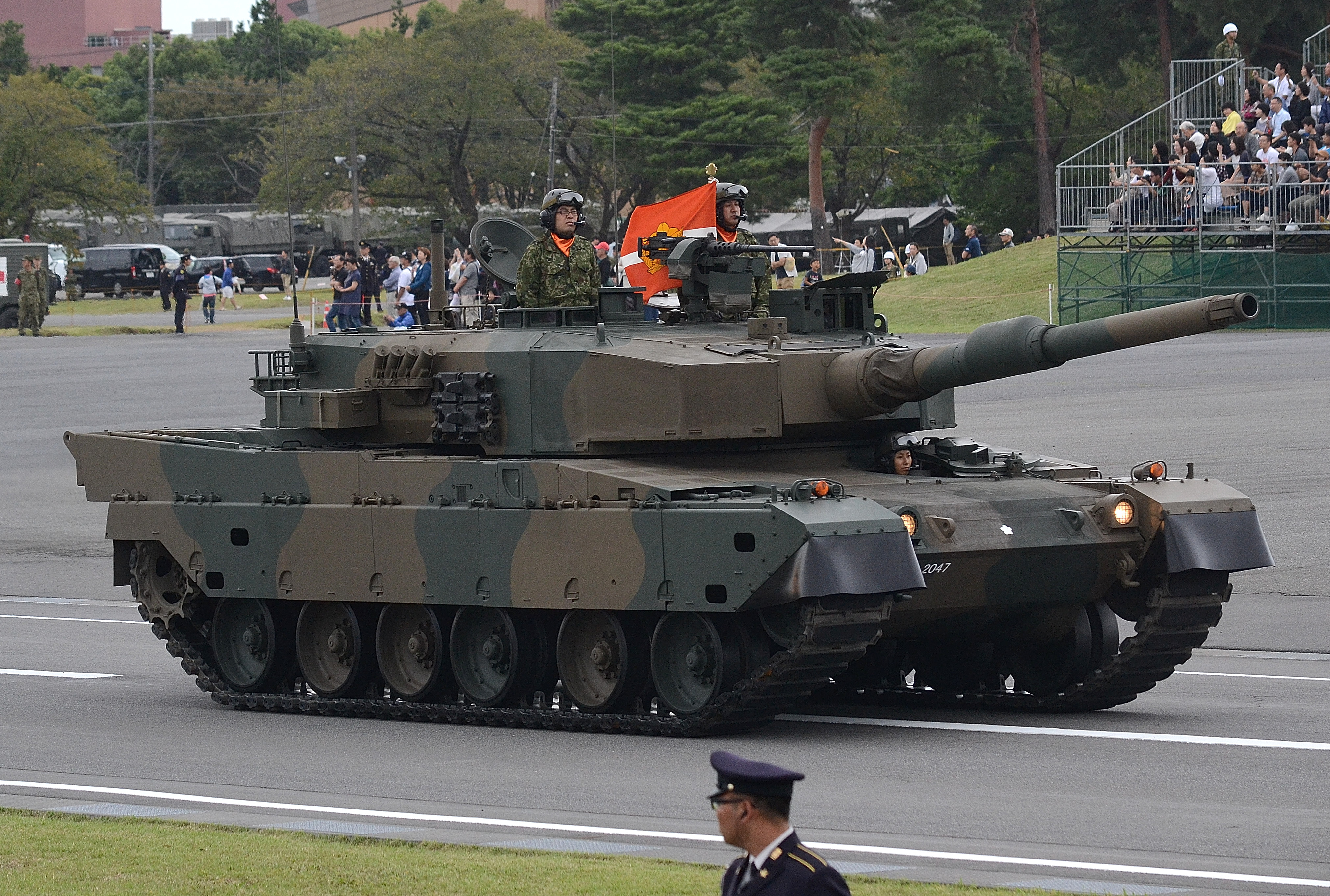 陸上自衛隊朝霞訓練場で行われた平成30年度自衛隊記念日観閲式総合予行での90式戦車。